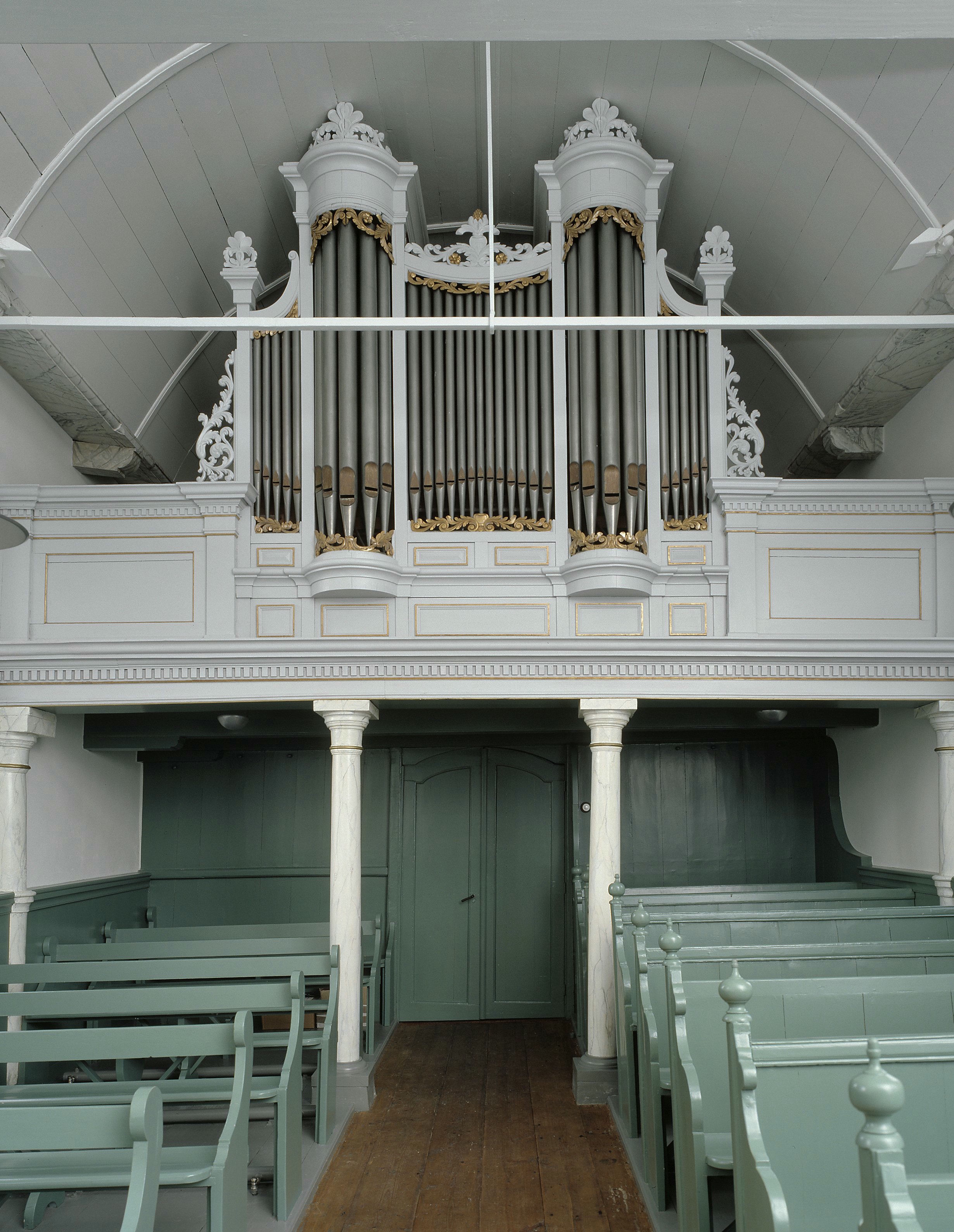 Nederlands Hervormde Kerk: Interieur, aanzicht orgel, orgelnummer 1312 (opmerking: Gefotografeerd voor Het Historische Orgel in Nederland 1850-1858)